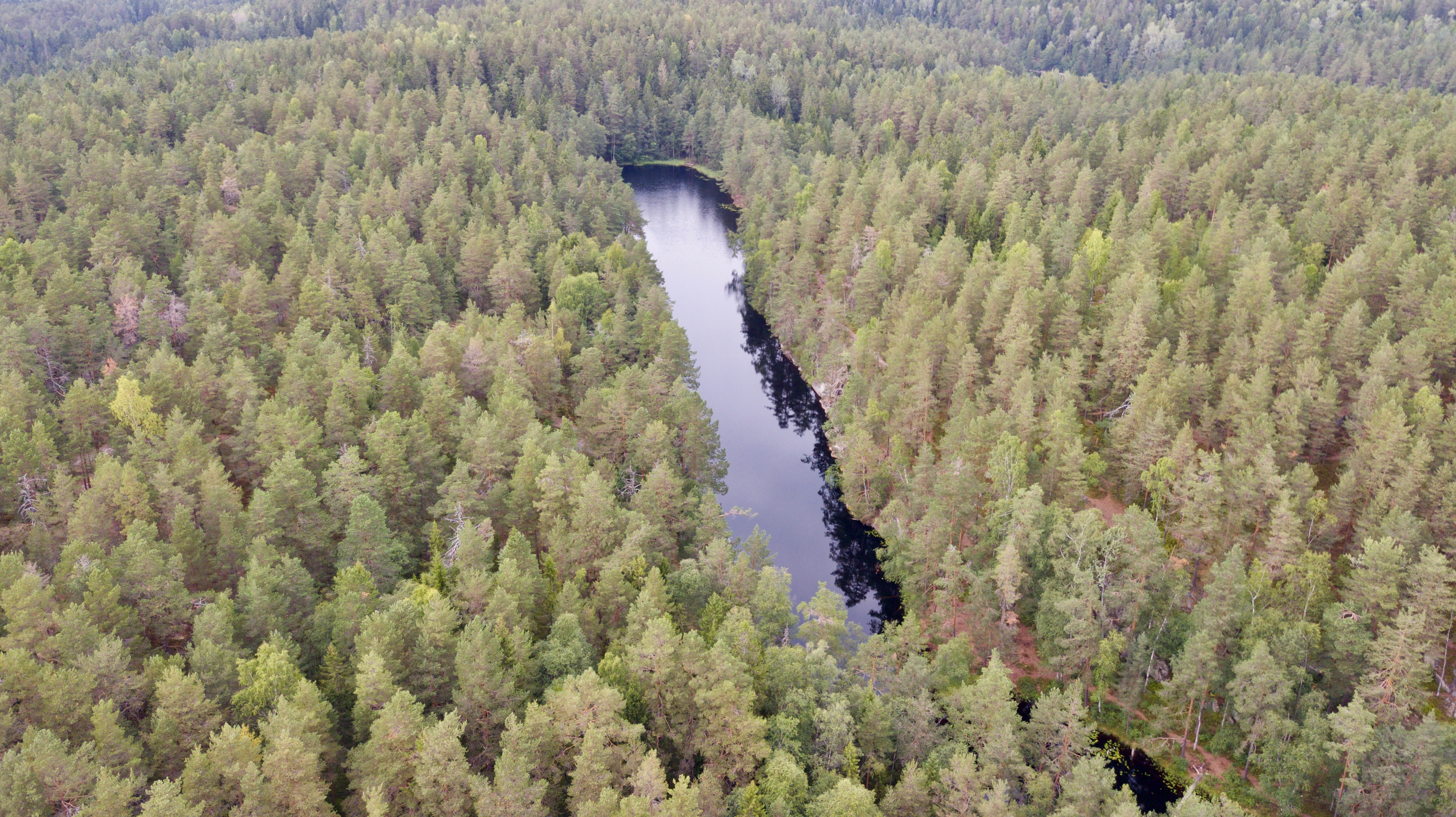 Solbergvann. Østmarka i Oslo.